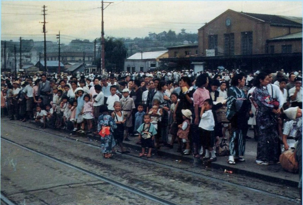 桜木町駅前で市電を待つ人々。 「敗戦国ニッポンの記録 昭和20年~27年 米国国立公文書館所蔵写真集 [下 ]」(アーカイブス出版、2007年)P55には終戦直後の1945年9月20日に撮影された同様のモノクロ写真が掲載されている。